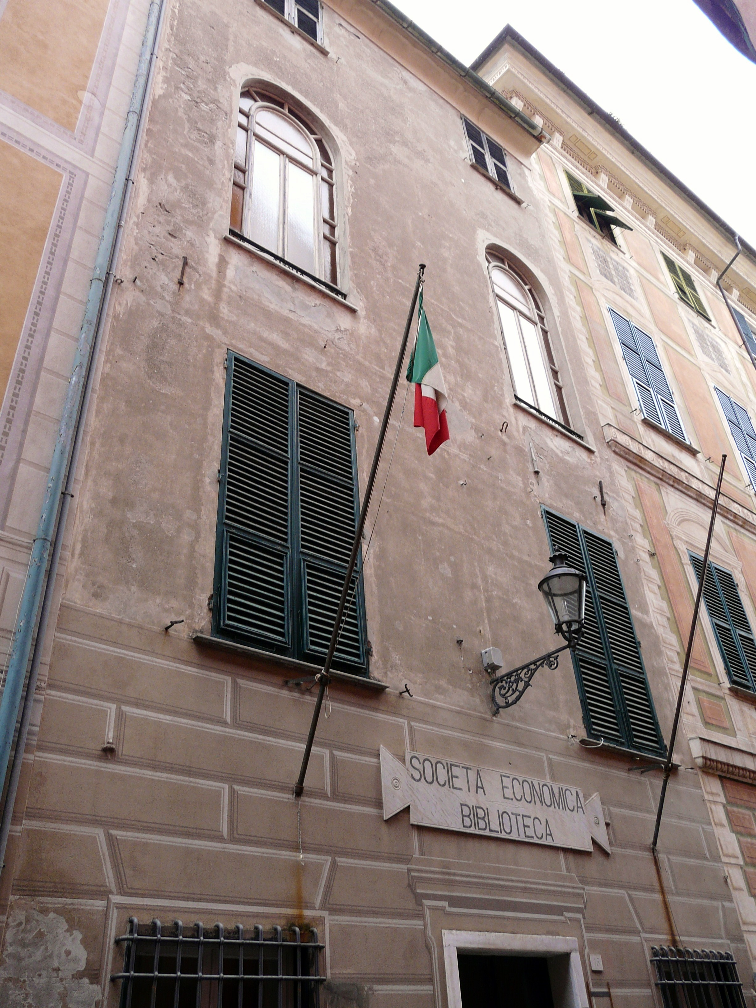 Palazzo della Società Economica di Chiavari, Liguria, Italia